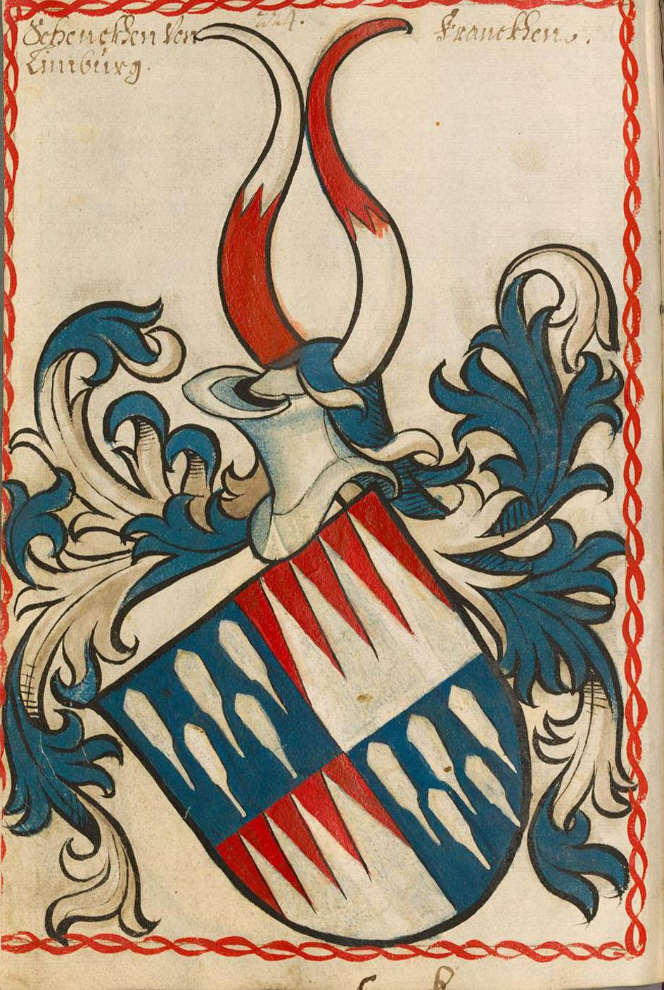 Scheibler'sches Wappenbuch , älterer Teil Schenken von Limburg